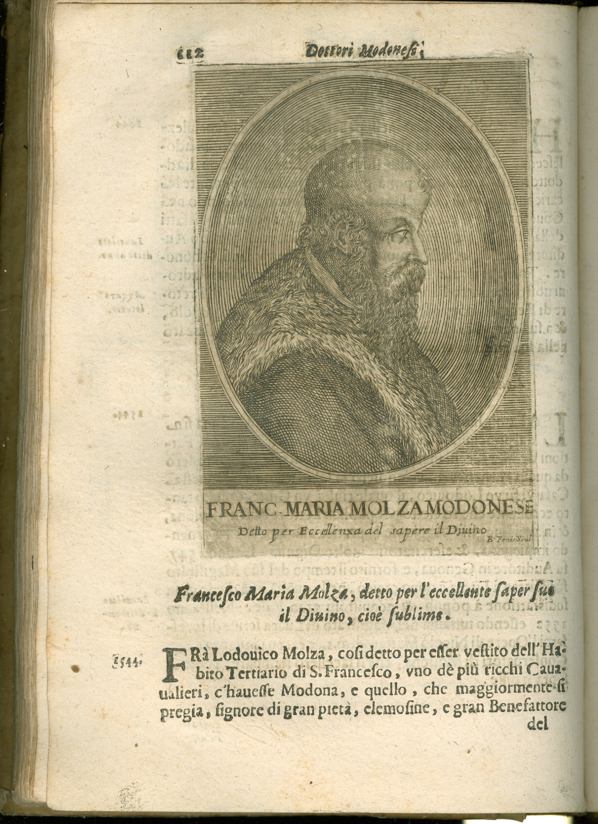 Francesco Maria Molza, detto per l'eccellente saper fue il Divino, cive sublime